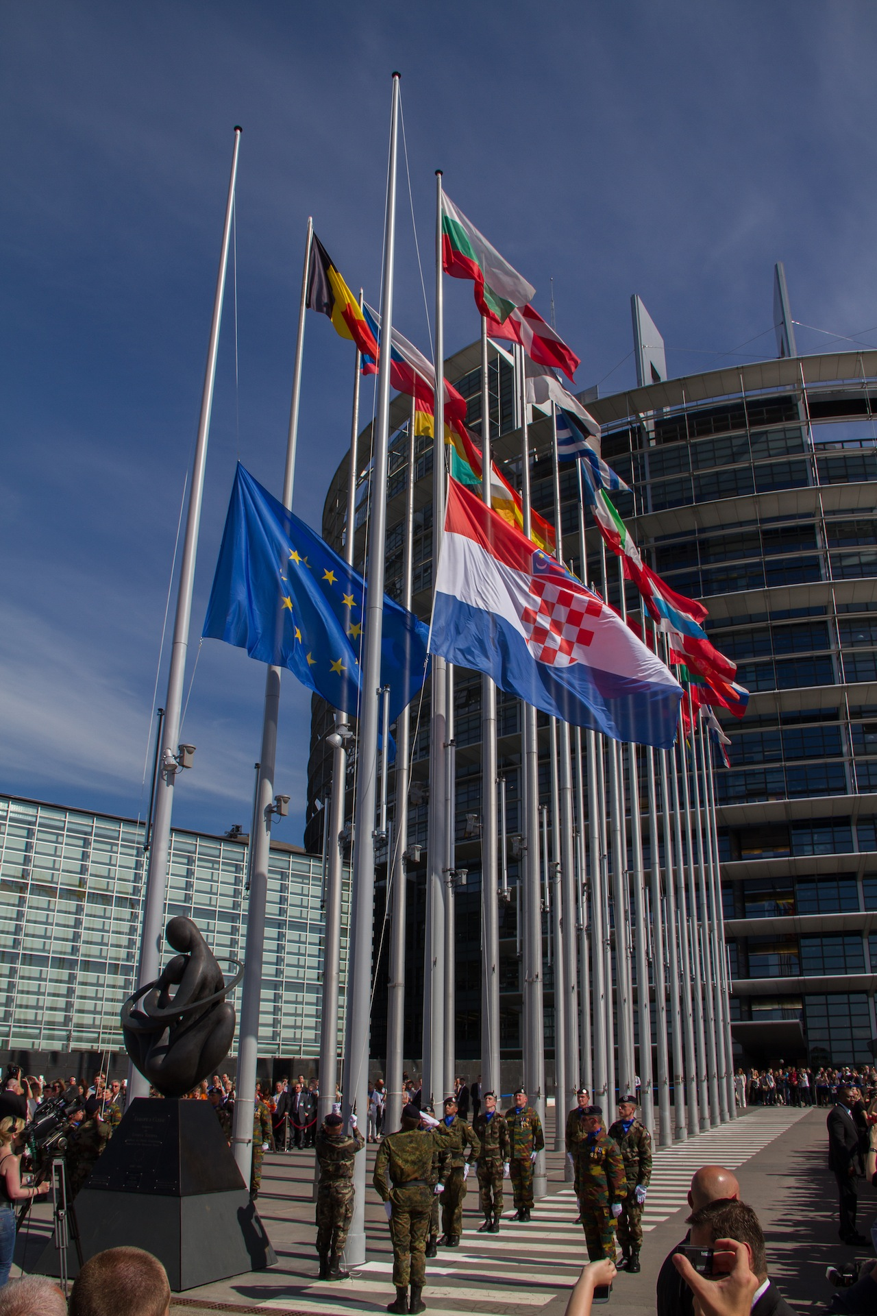 Cérémonie des couleurs au Parlement européen de Strasbourg à l’occasion de l’entrée de la Croatie comme 28ème État membre de l’Union européenne